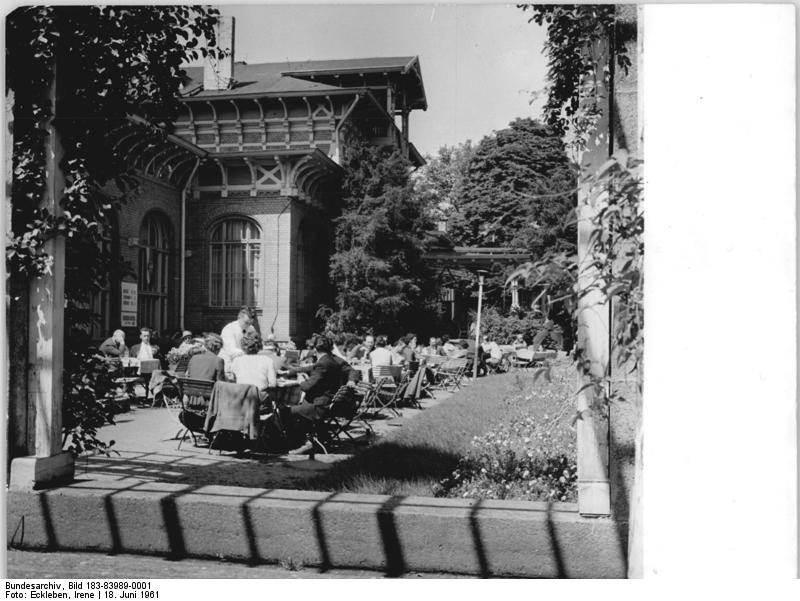 Magdeburg, Gaststätte Zentralbild Eckleben Vgt-Moa 18.6.1961 Parkgaststätte "Herrenkrug" Ein beliebtes Ausflugsziel der Magdeburer ist die HO-Gaststätte "Herrenkrug" im Stadtbezirk Mitte.